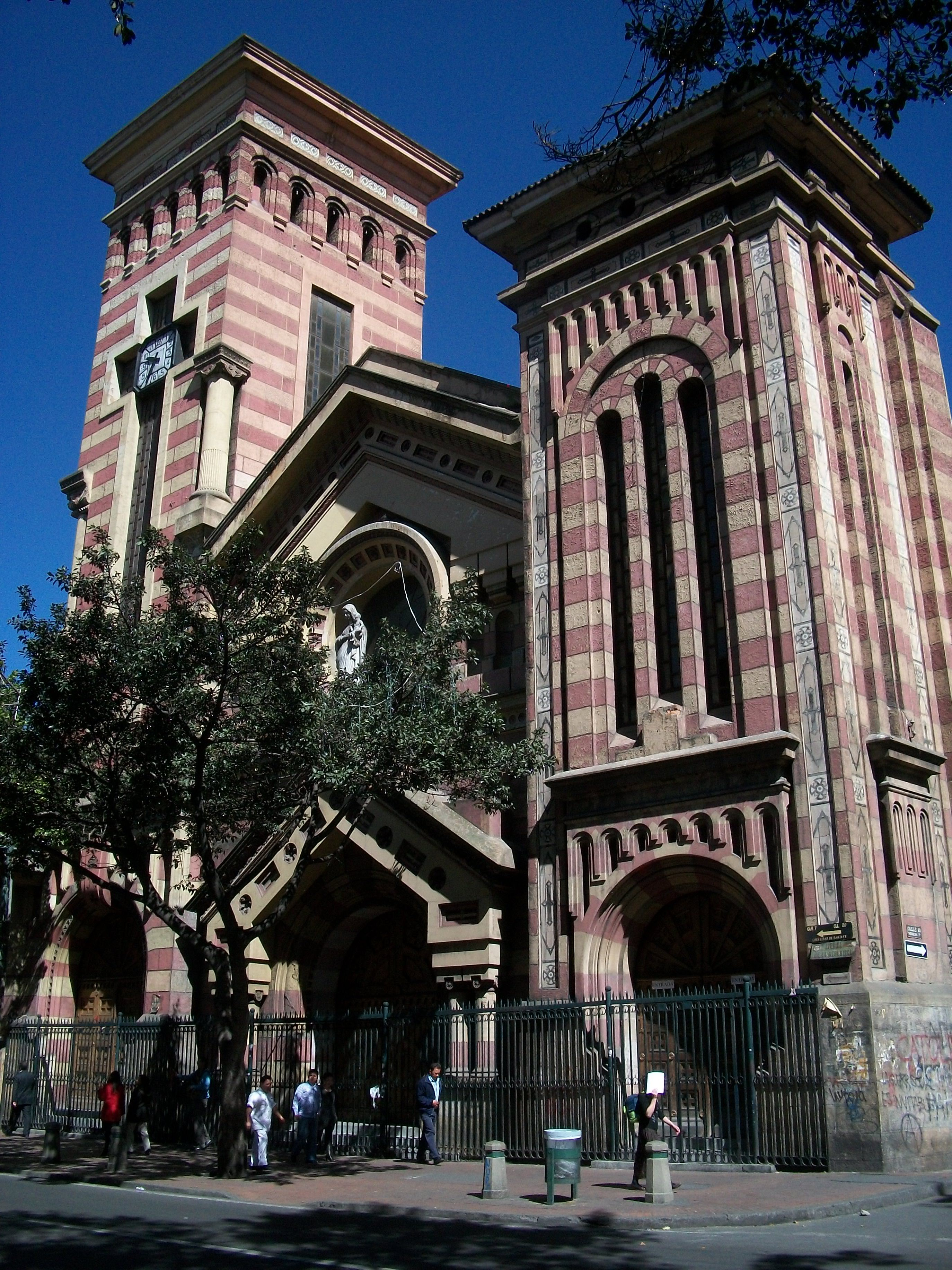 Fachada de la Iglesia de las Nieves.